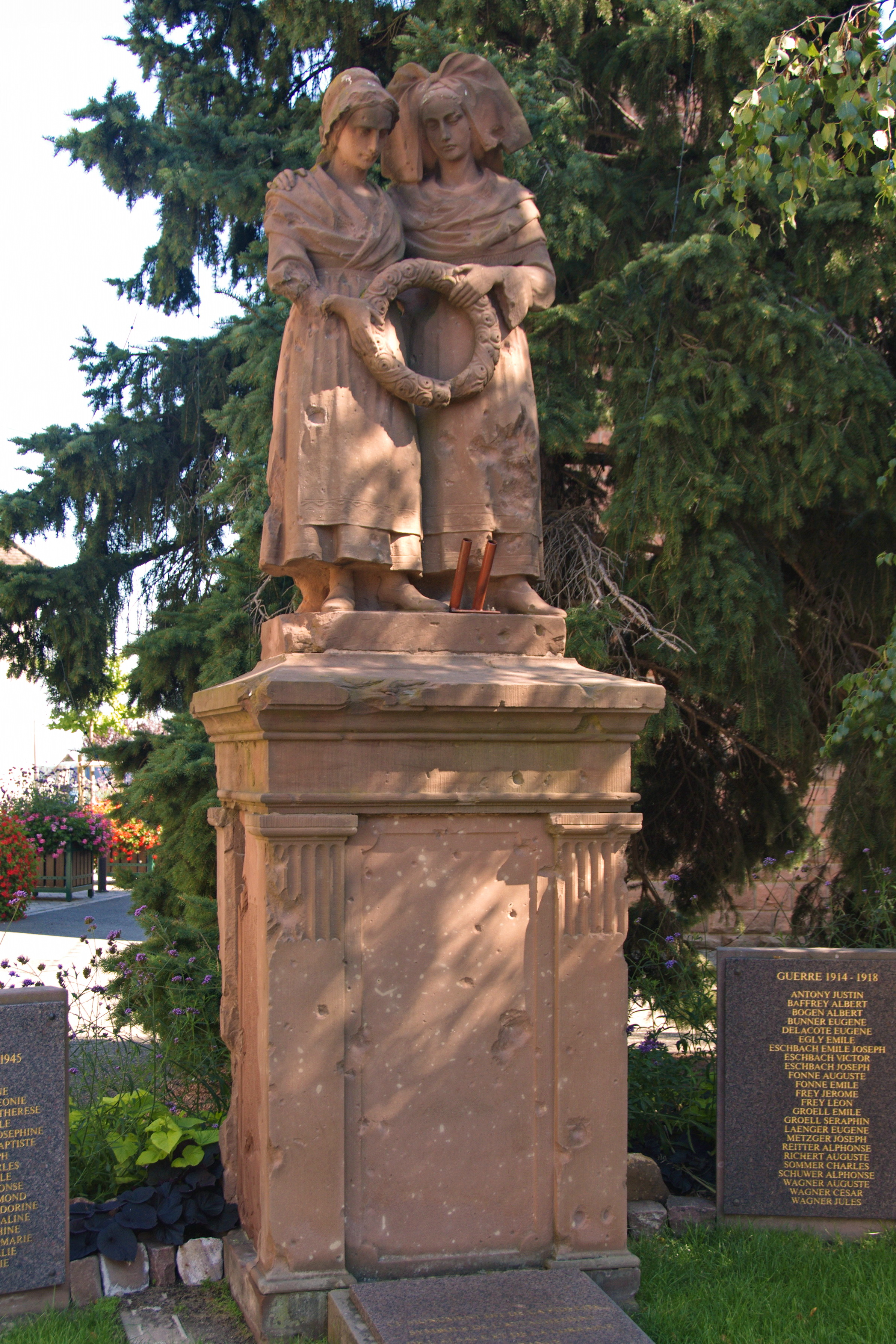 Monument de la Fidélité, Place de la MairiePlace de l'Église (InscritInscrit, 19961996) .